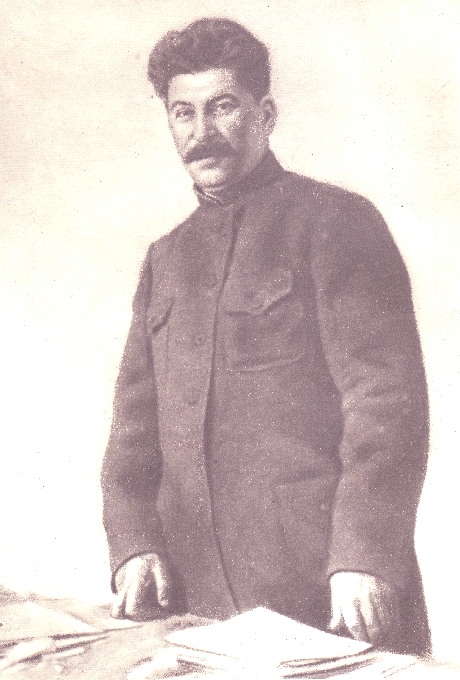 Портрет Йосипа Сталіна, меццо-тінто